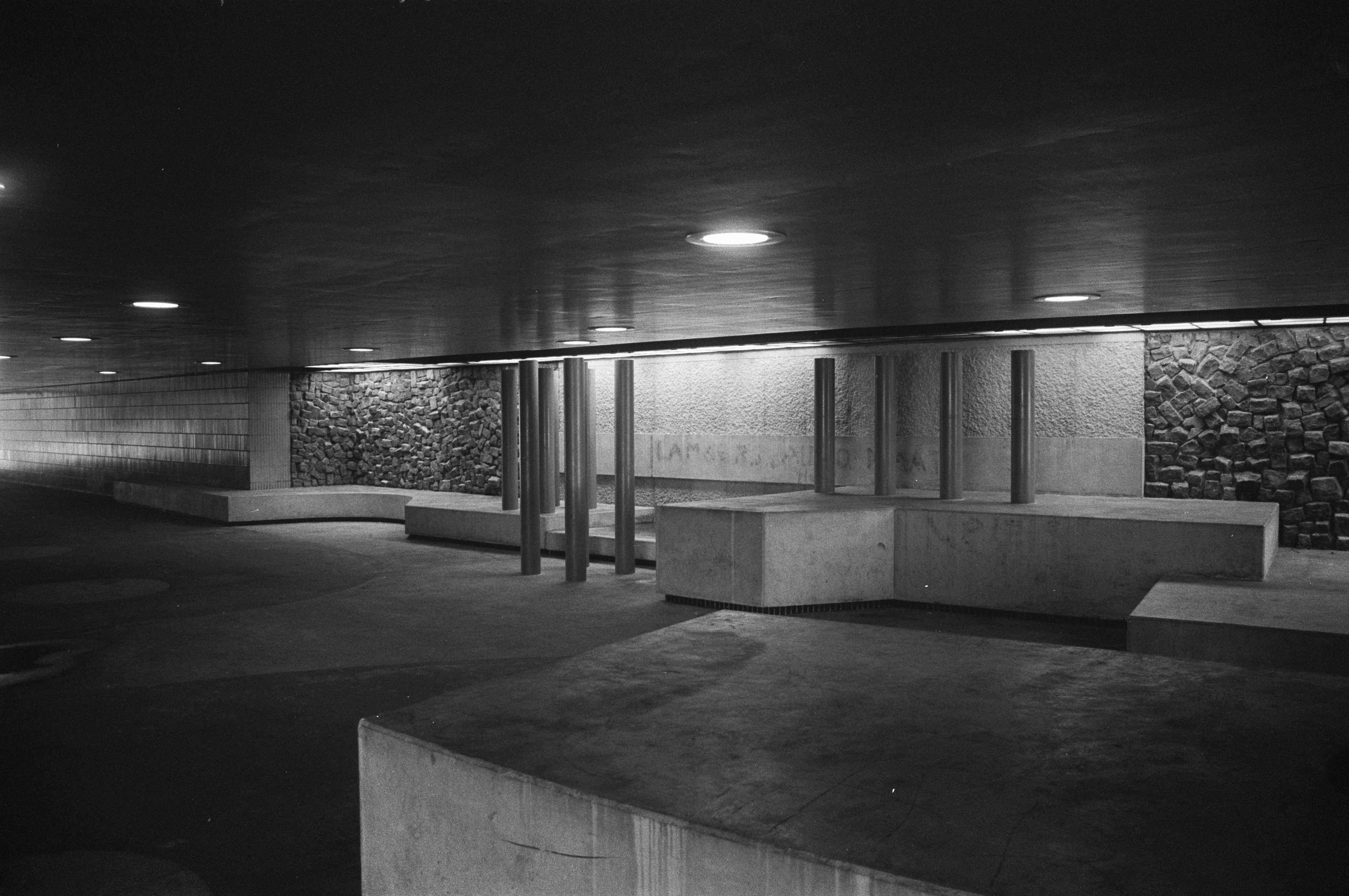 Collectie / Archief : Fotocollectie Anefo Reportage / Serie : [ onbekend ] Beschrijving : Voetgangersonderdoorgangen bij Waterlooplein en Mr. Visserplein , Amsterdam Datum : 21 september 1971 Locatie : Amsterdam, Noord-Holland Trefwoorden : Voetgangers, tunnels Fotograaf : Punt, […] / Anefo Auteursrechthebbende : Nationaal Archief Materiaalsoort : Negatief (zwart/wit) Nummer archiefinventaris : bekijk toegang 2.24.01.05 Bestanddeelnummer : 924-9601